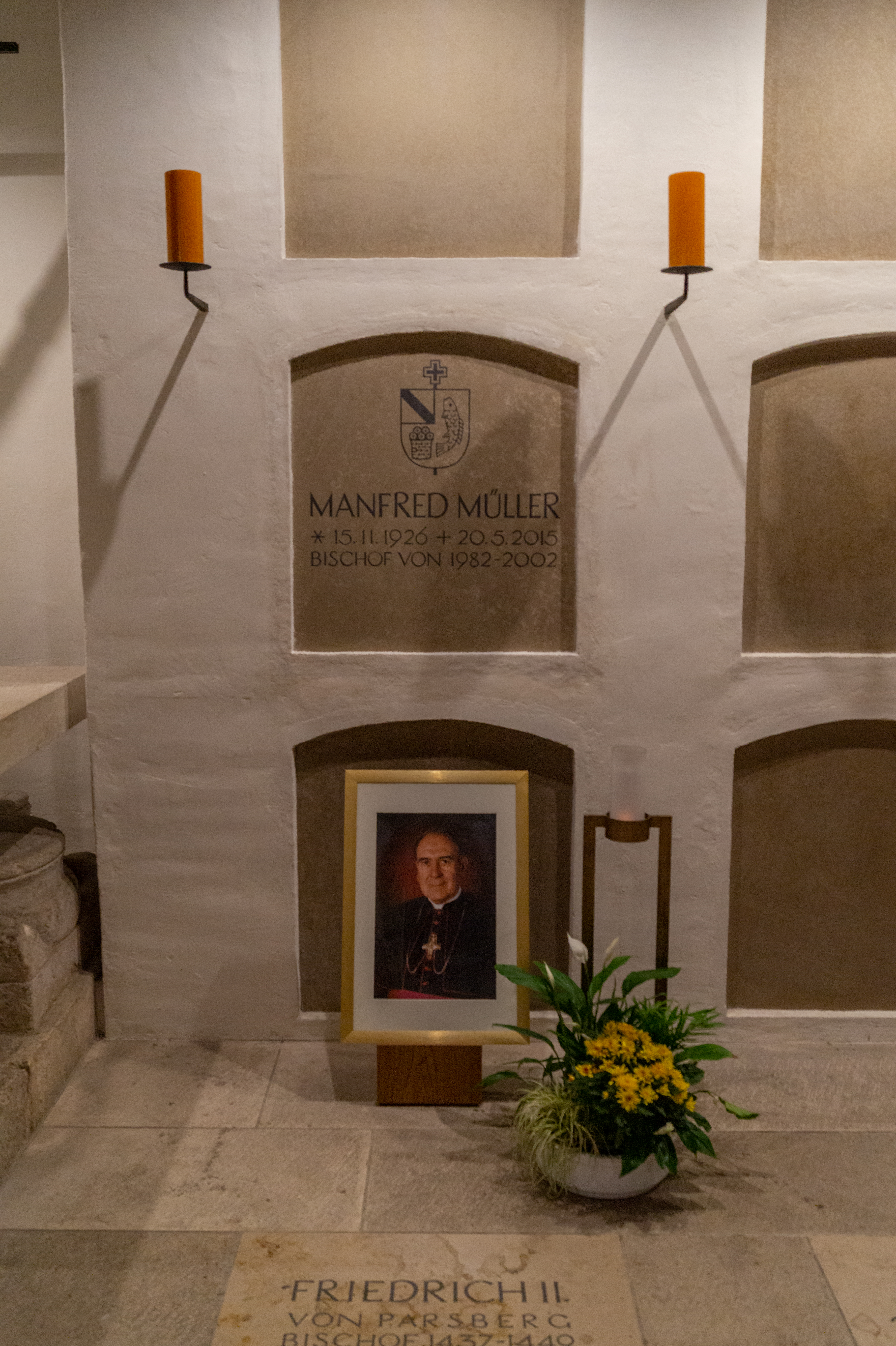 Grab von Manfred Müller in der Bischofsgrablege des Regensburger Doms